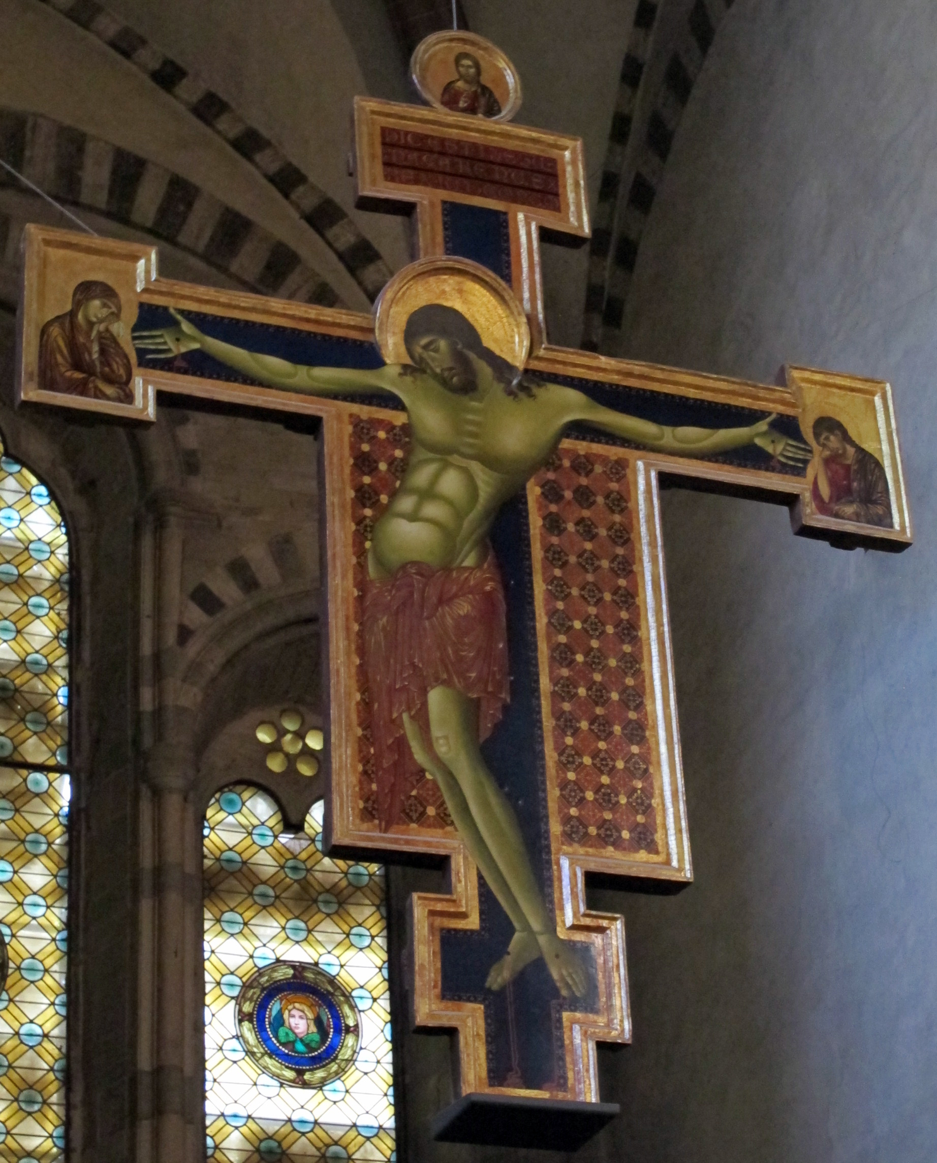 Arezzo, san domenico, int., crocifisso di cimabue